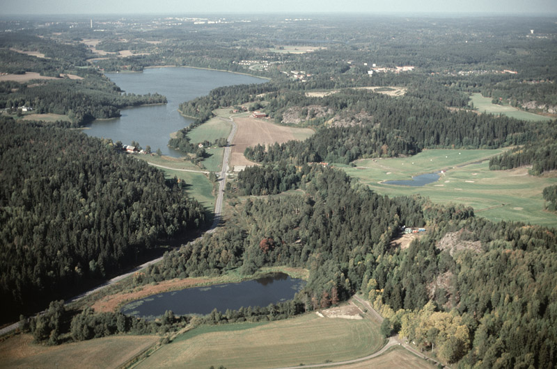 Malmbro; Gölan och Malmsjön Motiv: Malmbro Nyckelord: Flygbilder, Riksintressen Kategori: Insjömiljöer Malmbro; Gölan och Malmsjön.